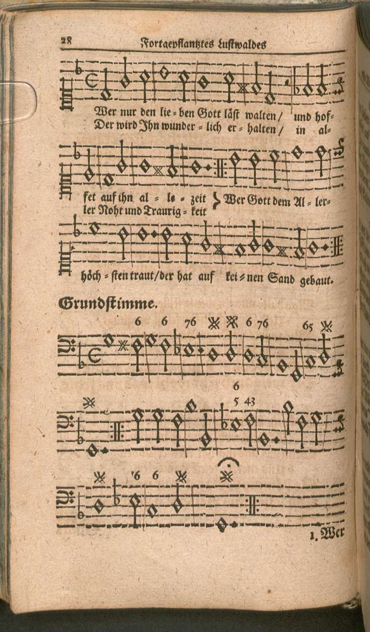 The hymn Wer nur den lieben Gott läßt walten on page 70 of Georg Neumark's hymn book